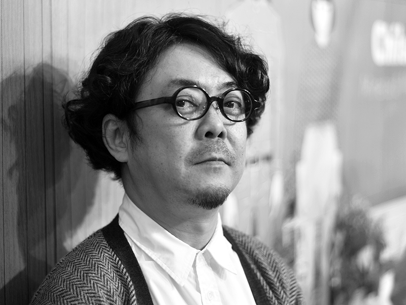 Minetarō Mochizuki au Festival d'Angoulême 2016.